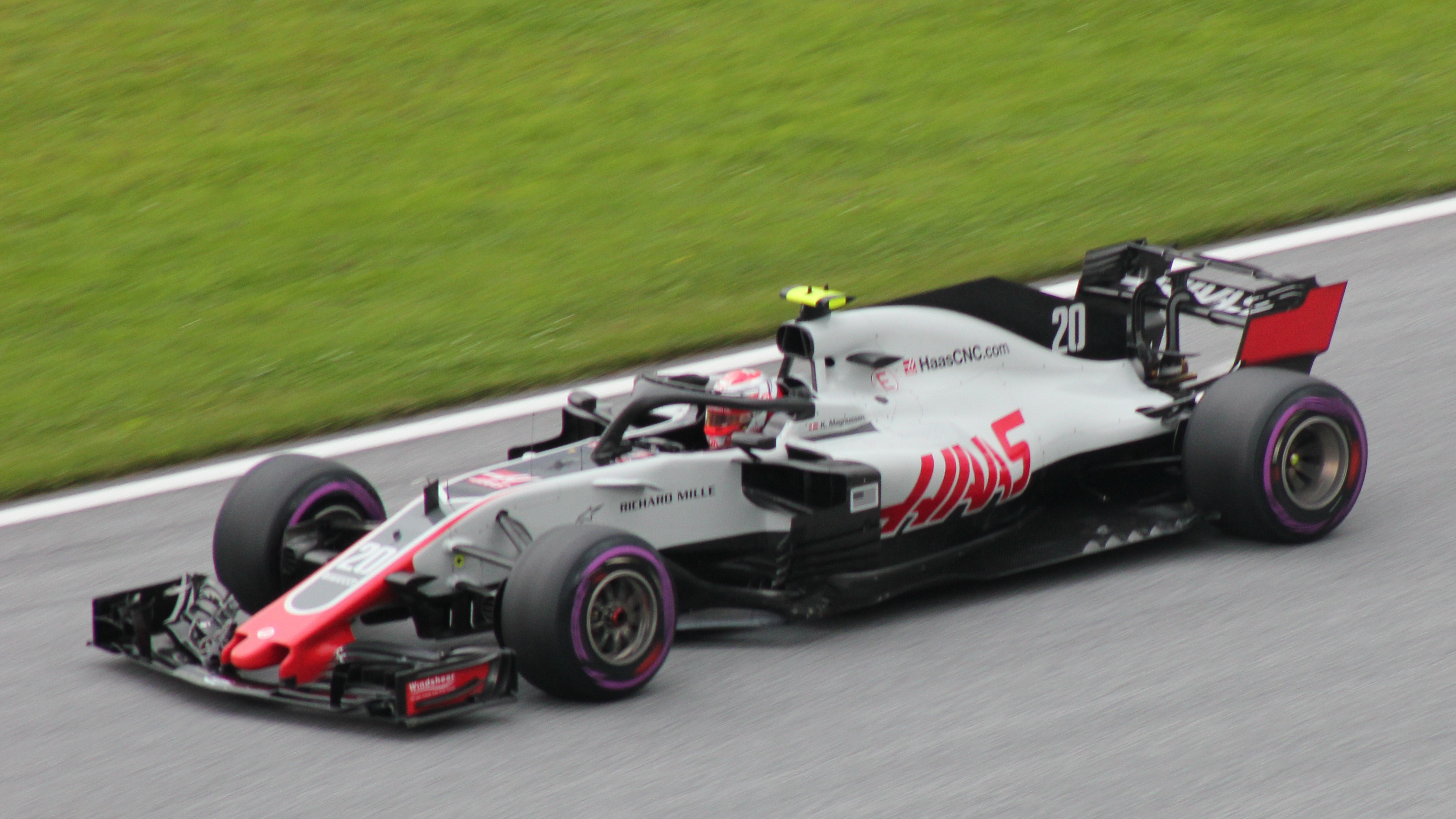 20 Magnussen beim Rennwochenende in Österreich 2018